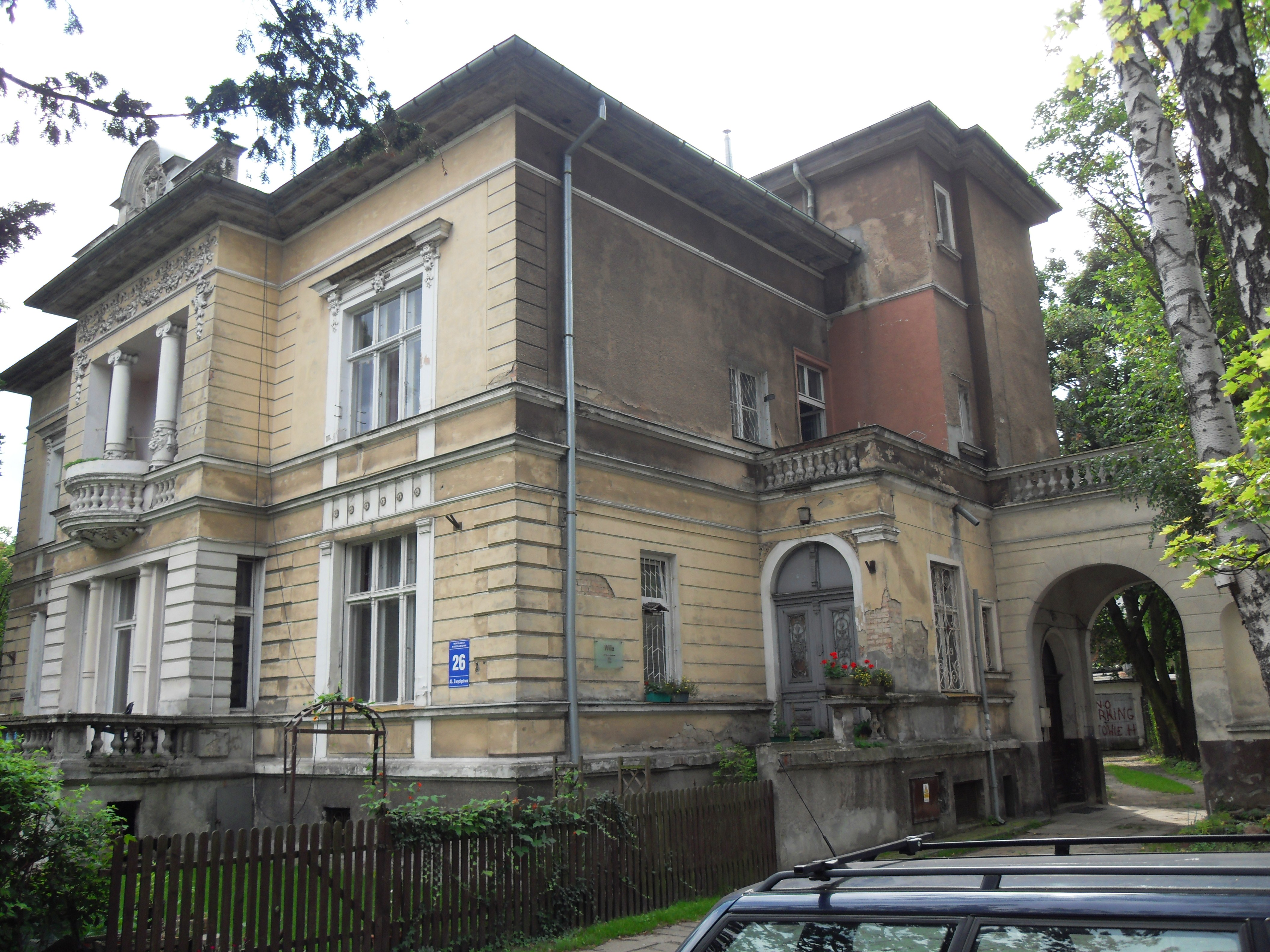 Gdańsk Wrzeszcz Górny, al. Zwycięstwa 26. Willa z 1896 r.